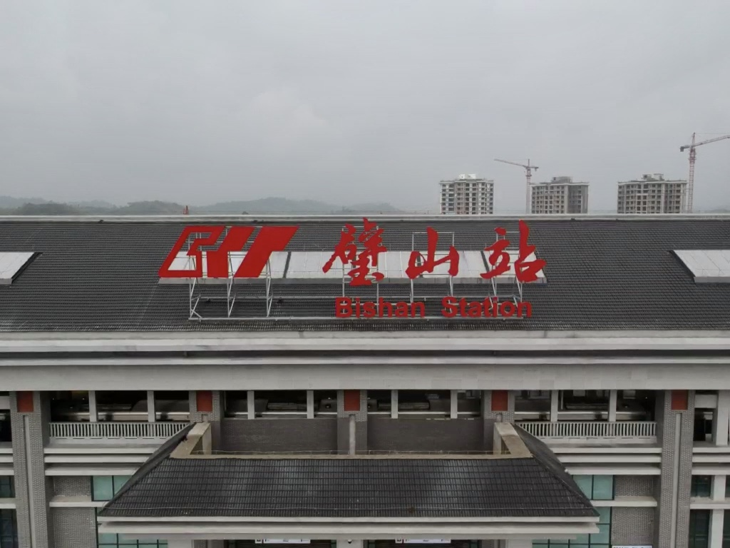 中文（中国大陆）: 开通前曾使用过的重庆轨道交通璧山站站牌。该站牌与国铁璧山站一样采用了书法字体，同时使用了一号线线路色石榴红。 然而，在2019年12月26日（开通前四日）这一红色书法字站牌疑似未通过专家评审，被更换为重庆轨道交通标志色绿色和微软雅黑字体的璧山站字样。 由于拍摄时使用的无人机出现了一些技术问题，画面较为模糊。